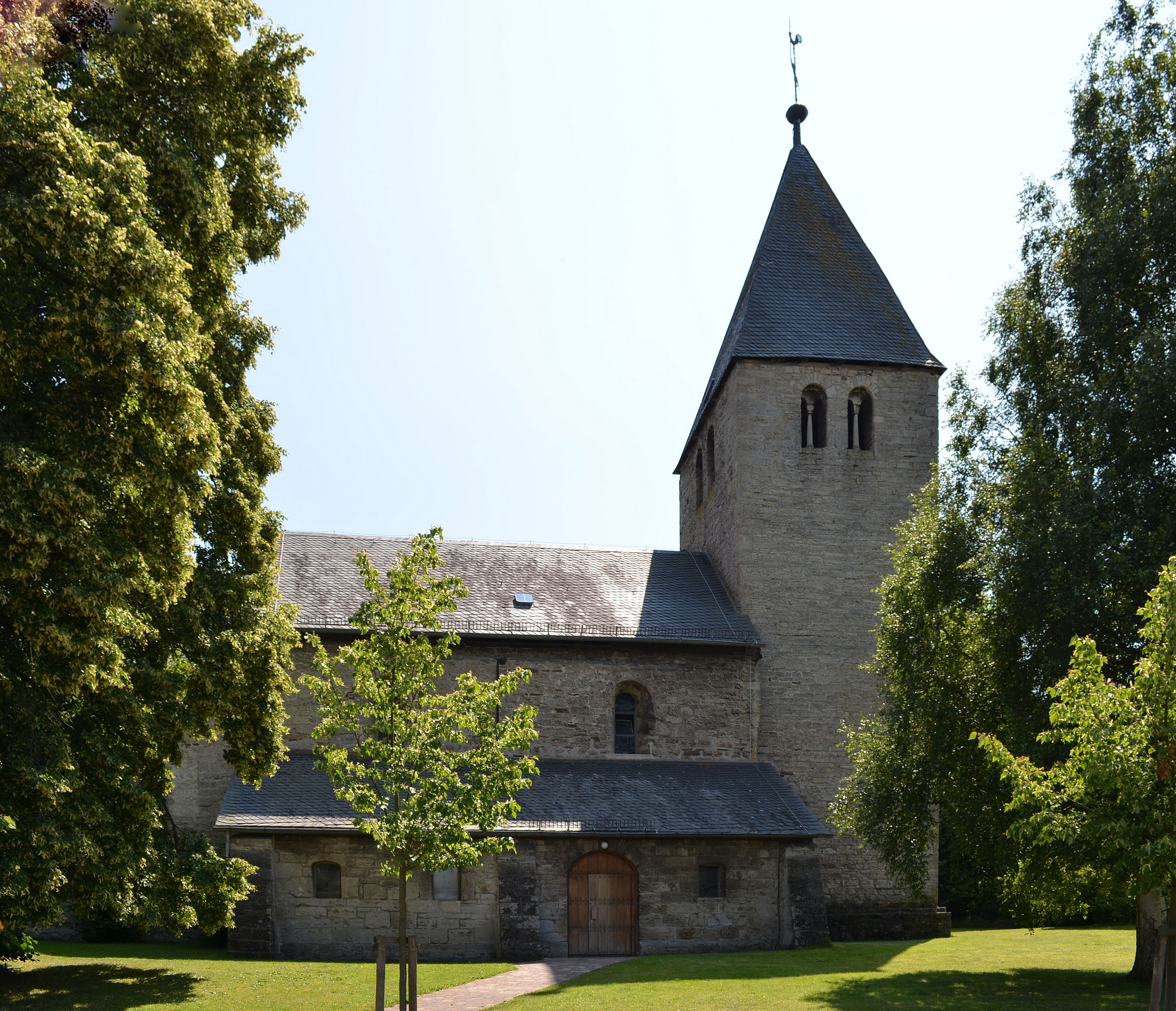 Heringhausen, Diemelsee, Kirche St. Barbara, Außenansicht 1